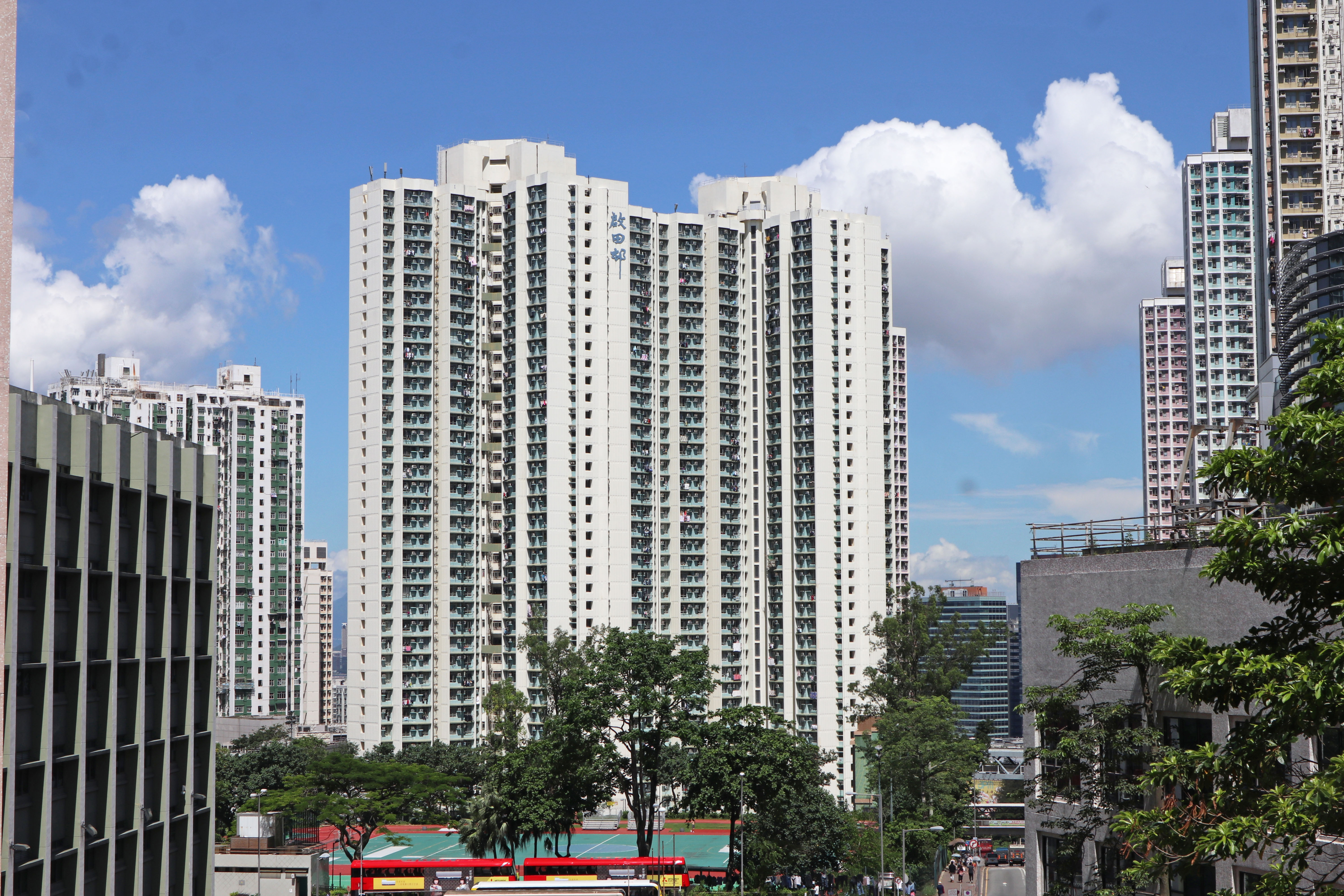 藍田啟田邨啟信樓及啟旺樓外觀